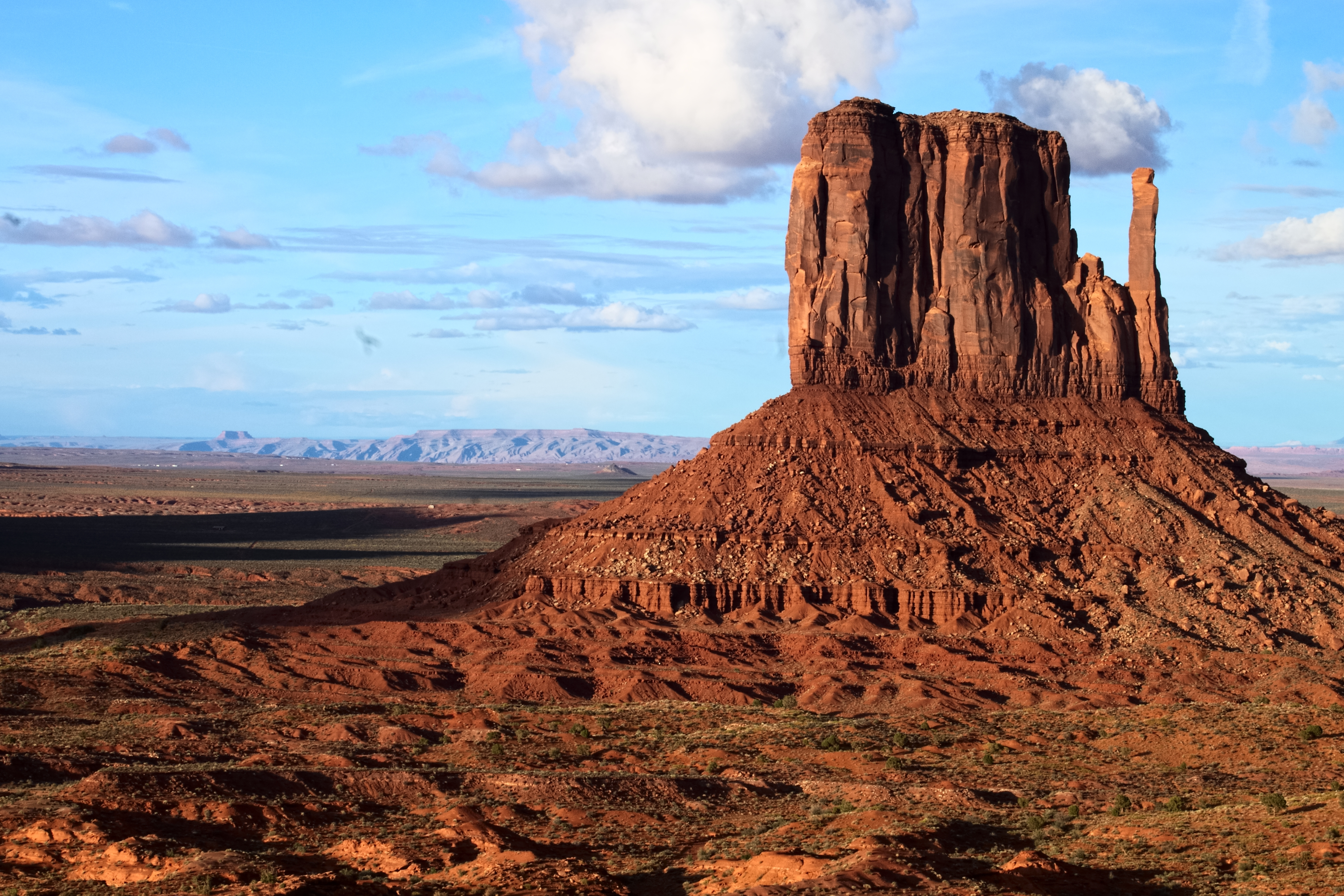 Durant les années 1940, Monument Valley est devenu un véritable emblème du Wild Wild West, grâce à Hollywood et John Ford. Aujourd'hui, c'est sans nul doute ce parc tribal qui caractérise le mieux l'Ouest sauvage américain et l'idée que l'on s'en fait.